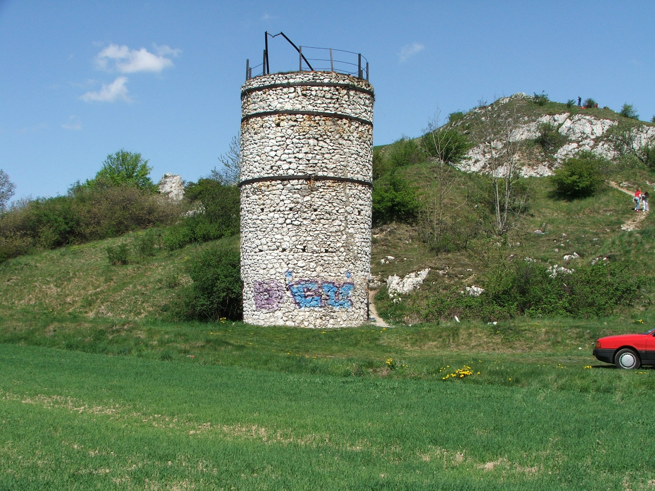 Czajowice (województwo małopolskie)